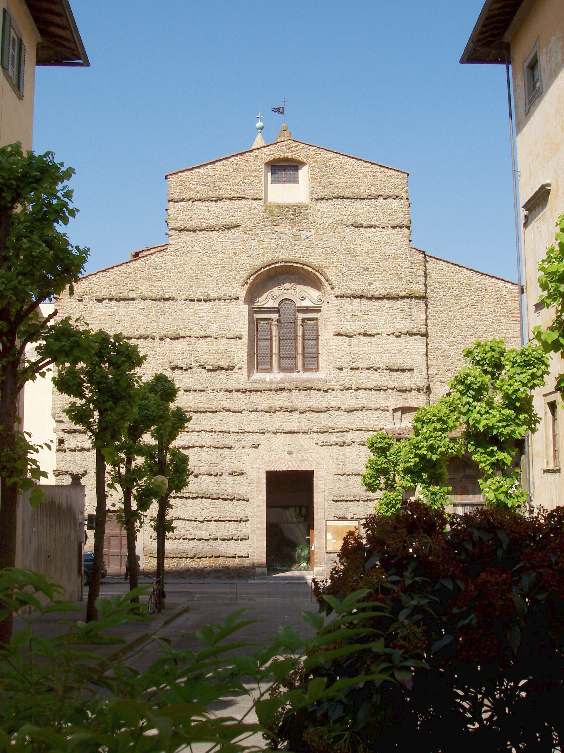 Facciata della Chiesa della Santissima Annunziata ad Arezzo